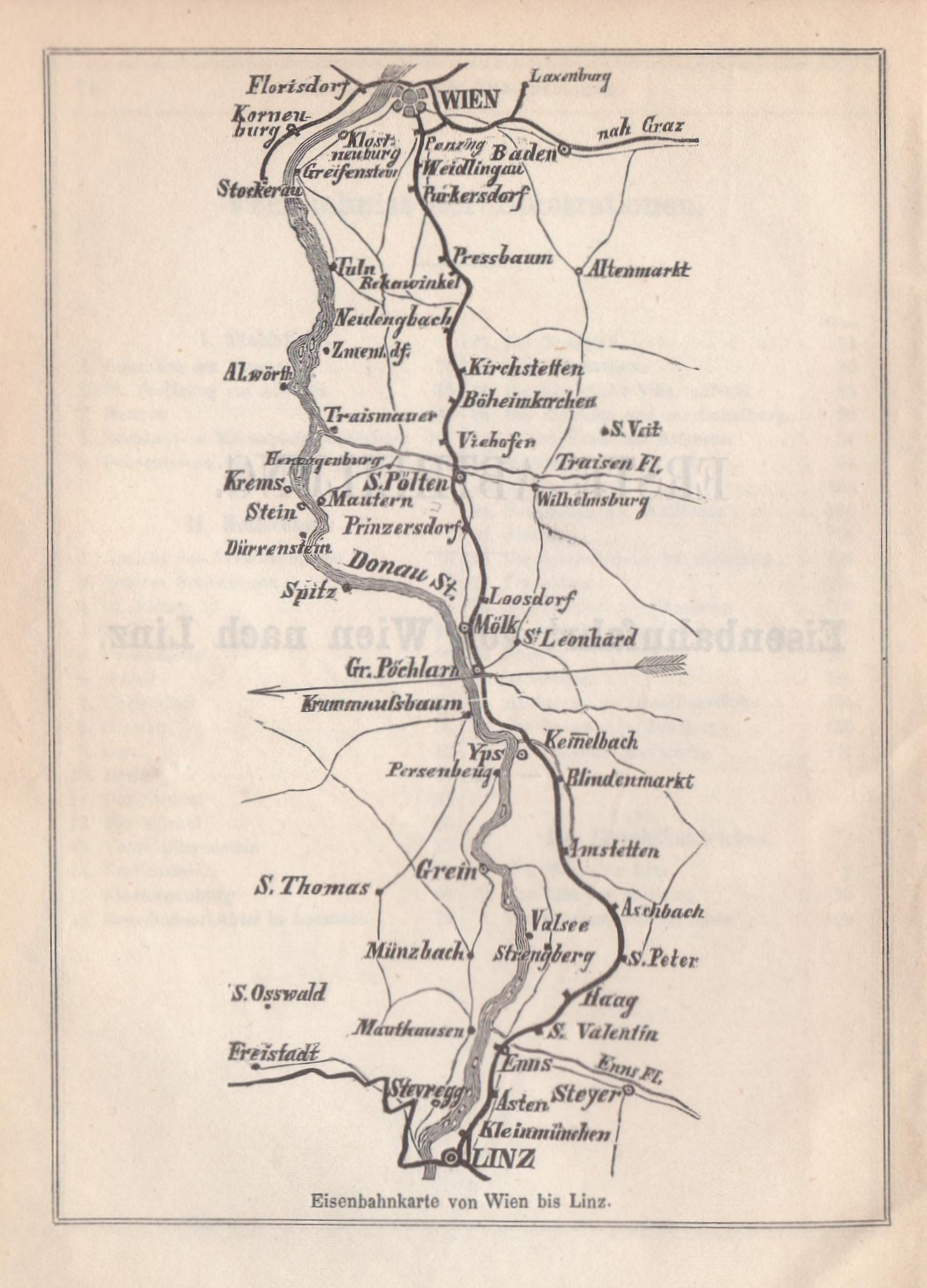 Lloyd's Reiseführer: Eisenbahn Wien-München 1861, Eisenbahnstrecke Wien-Linz